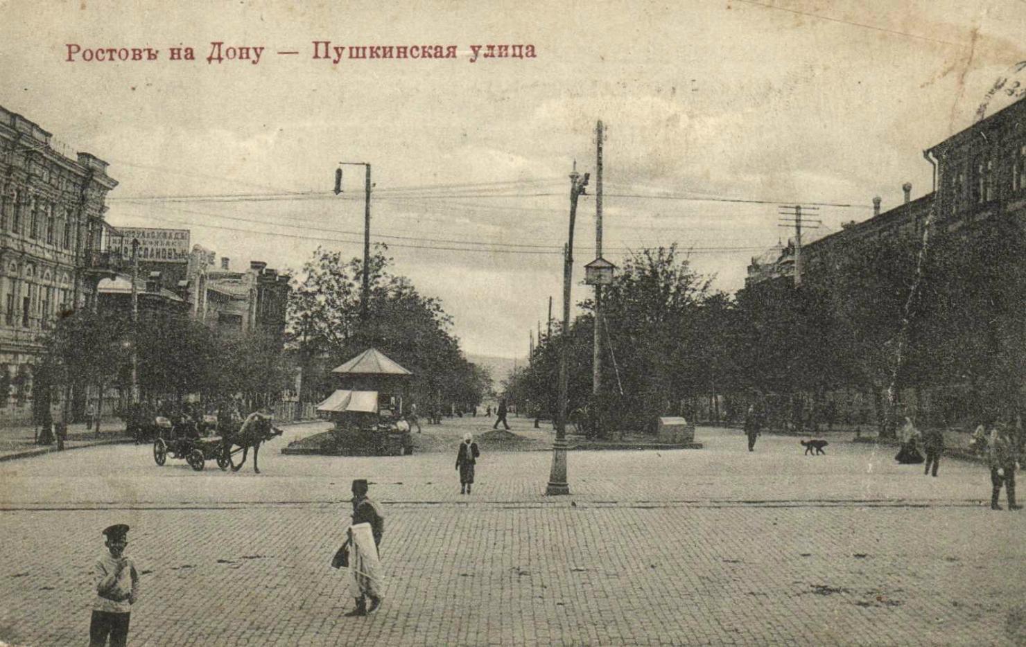 Ростов-на-Дону до Октябрьской революции. Пушкинская улица.